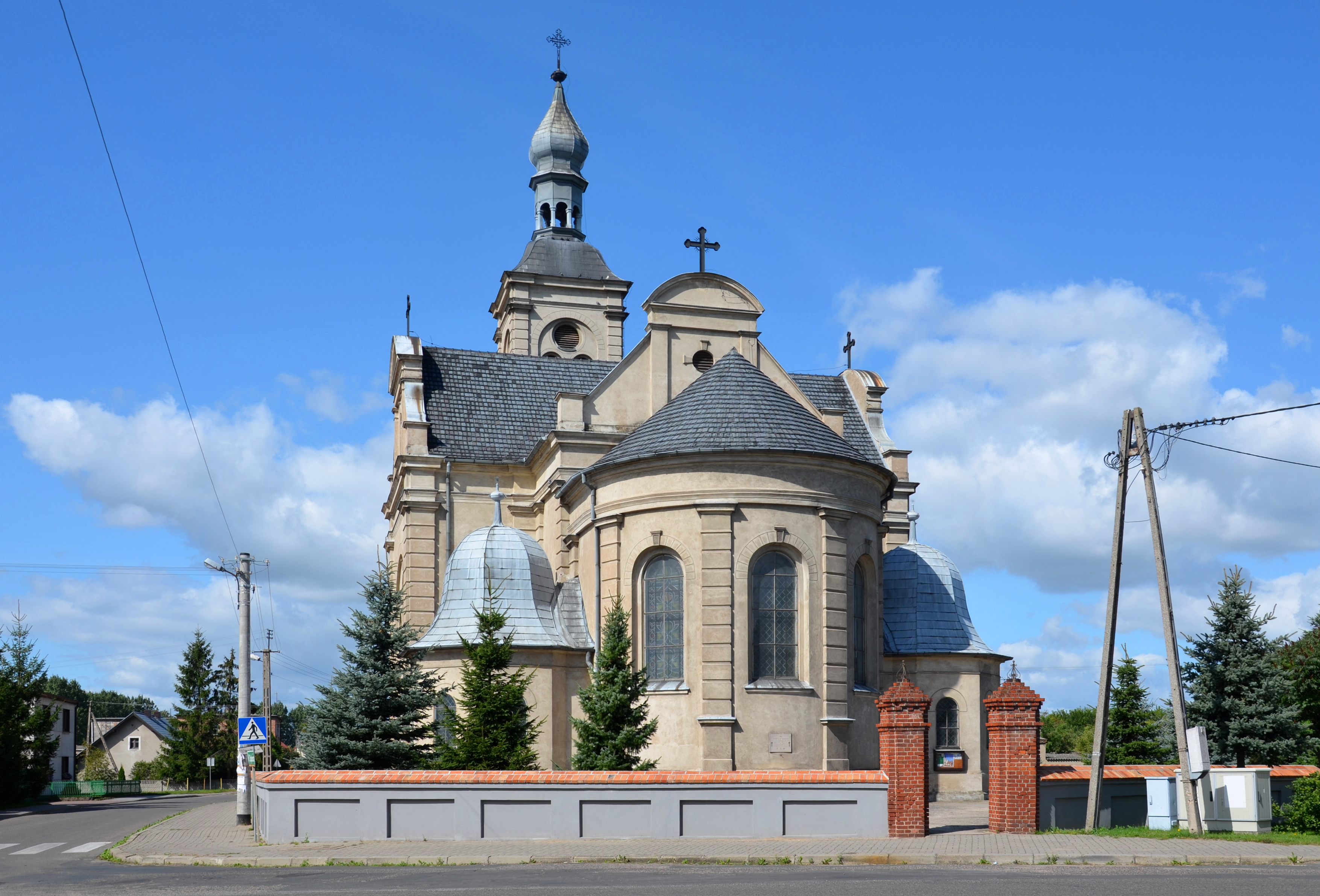 Dakowy Mokre, zespół kościoła par. p.w. św. Katarzyny, 1901-1904